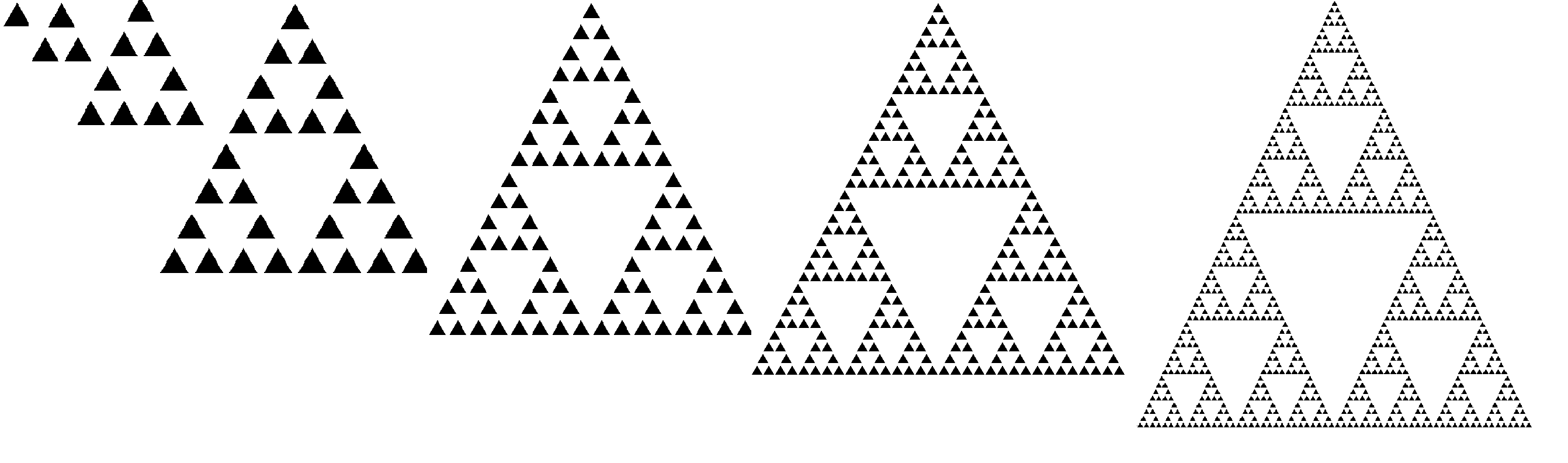 Triangulo de Sierpinky